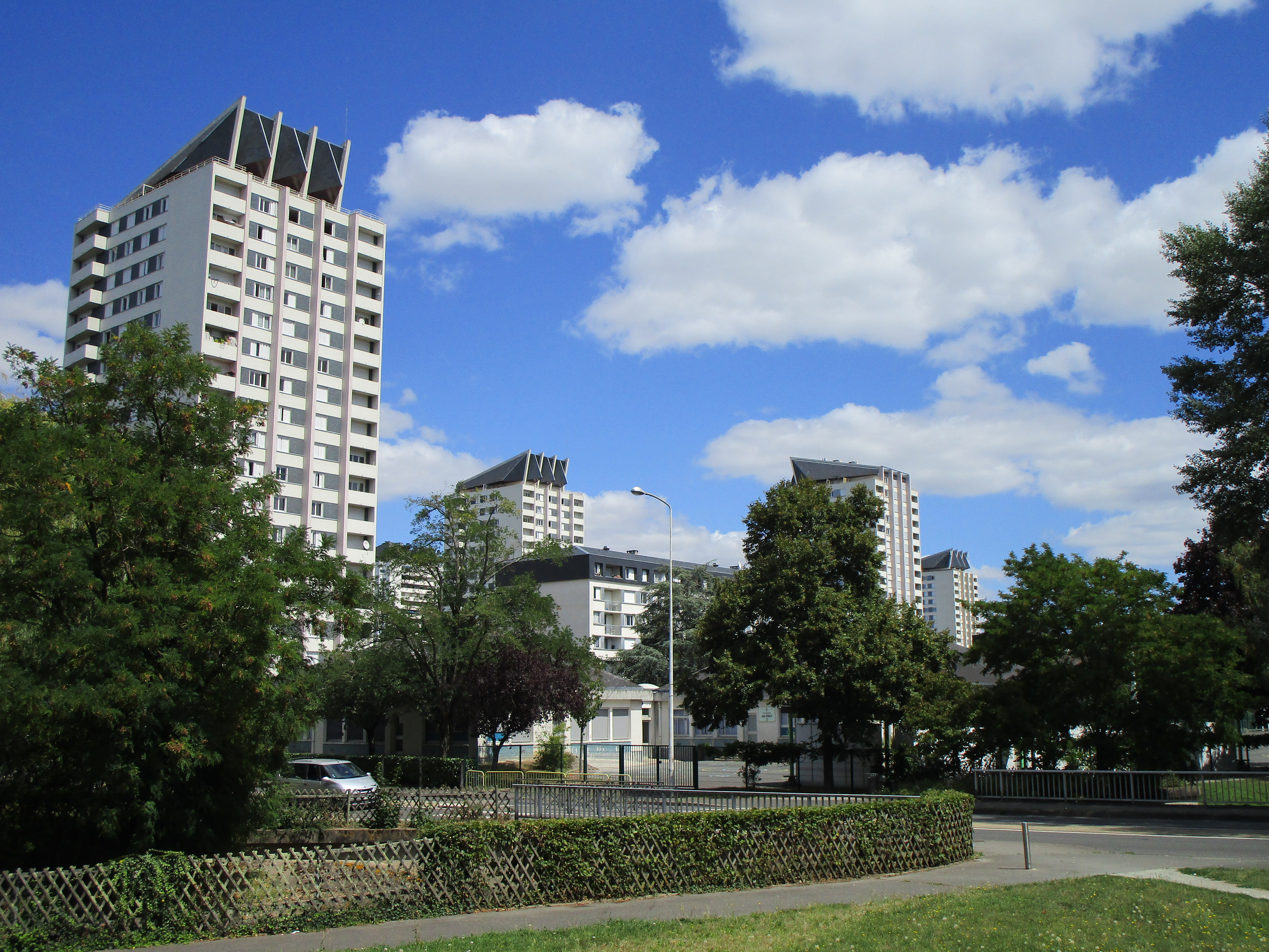 Plusieurs tours du quartier des Fontaines à Tours. Au premier plan, l'avenue Mozart et l'école Arthur Rimbaud.